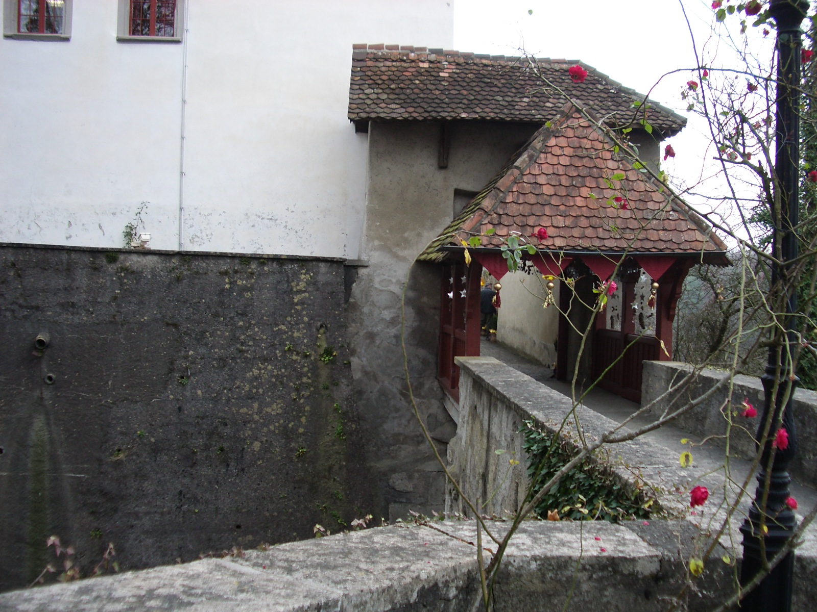 Biberstein AG, Switzerland self-made, December 2006